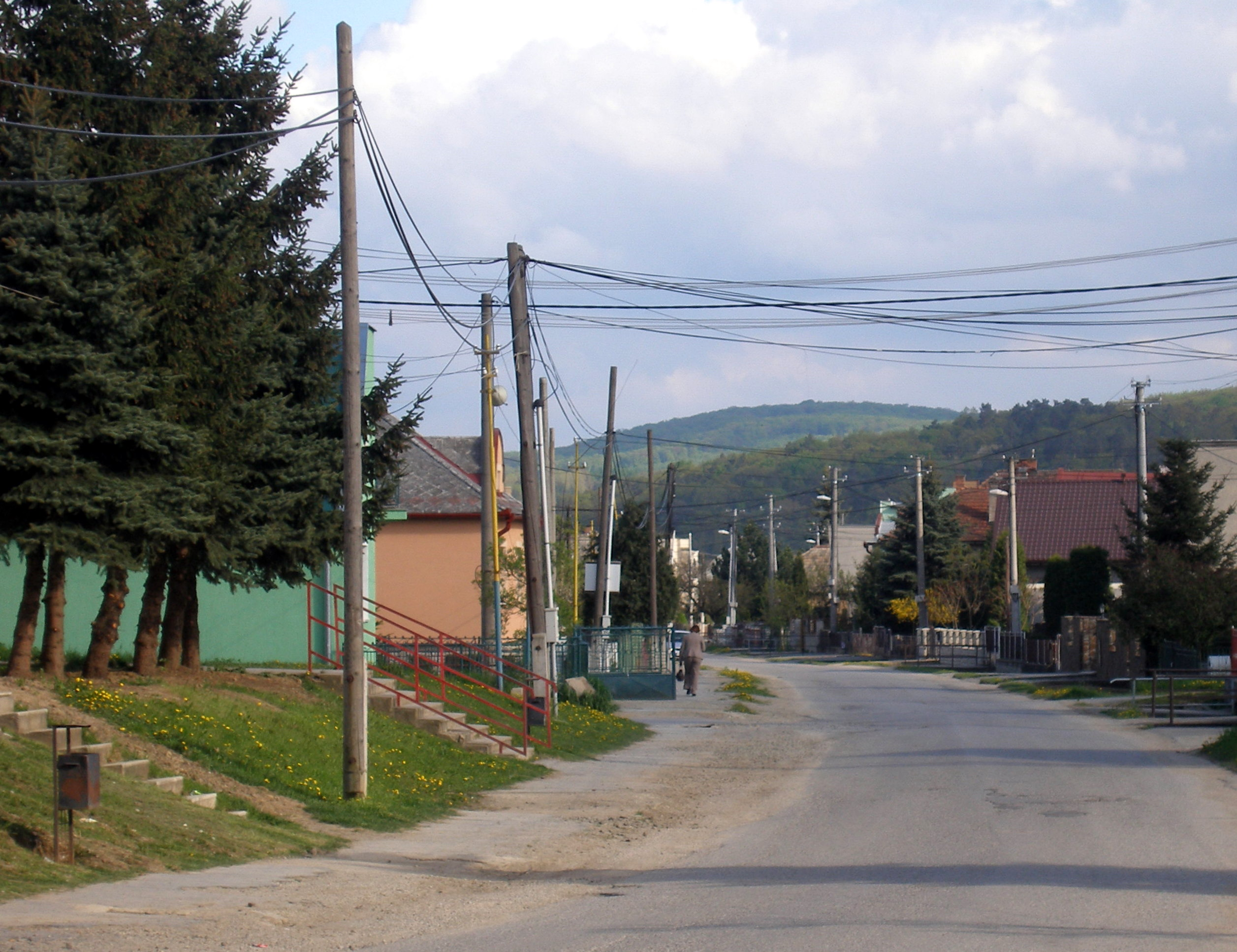 Obec Župčany okres Prešov región Šariš